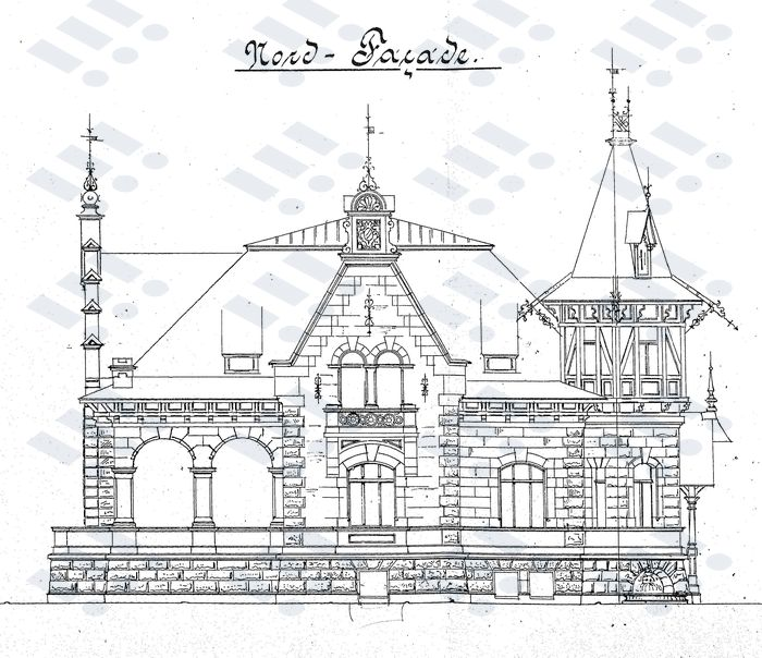 Jeden ze stavebních pohledů na vilu od Felixe Neumanna